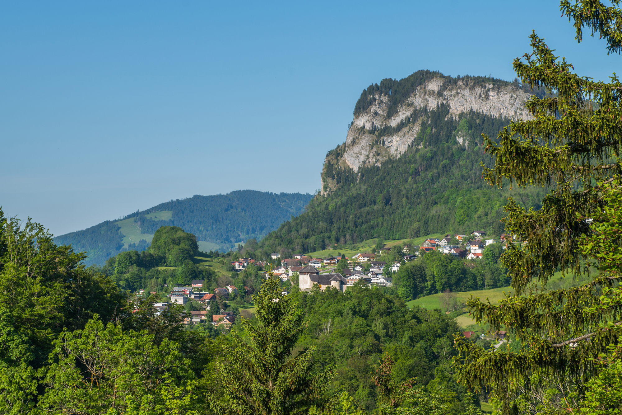 Blick von der Burgruine Alt-Ems auf Reute in Hohenems und der Burg Neu-Ems (Schloss Glopper).